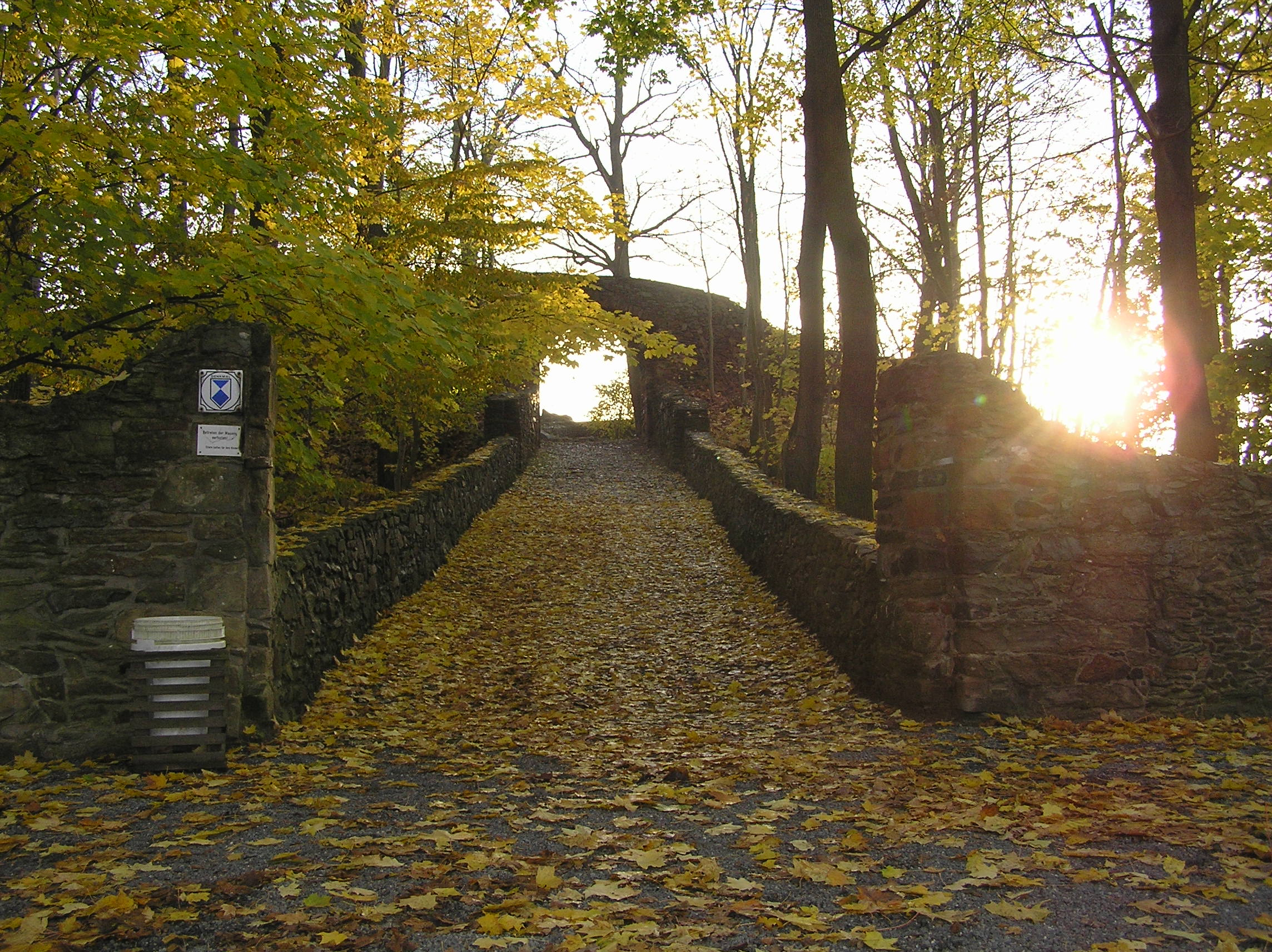 Aufgang vom Museumshof zur Burgruine Reichenfels